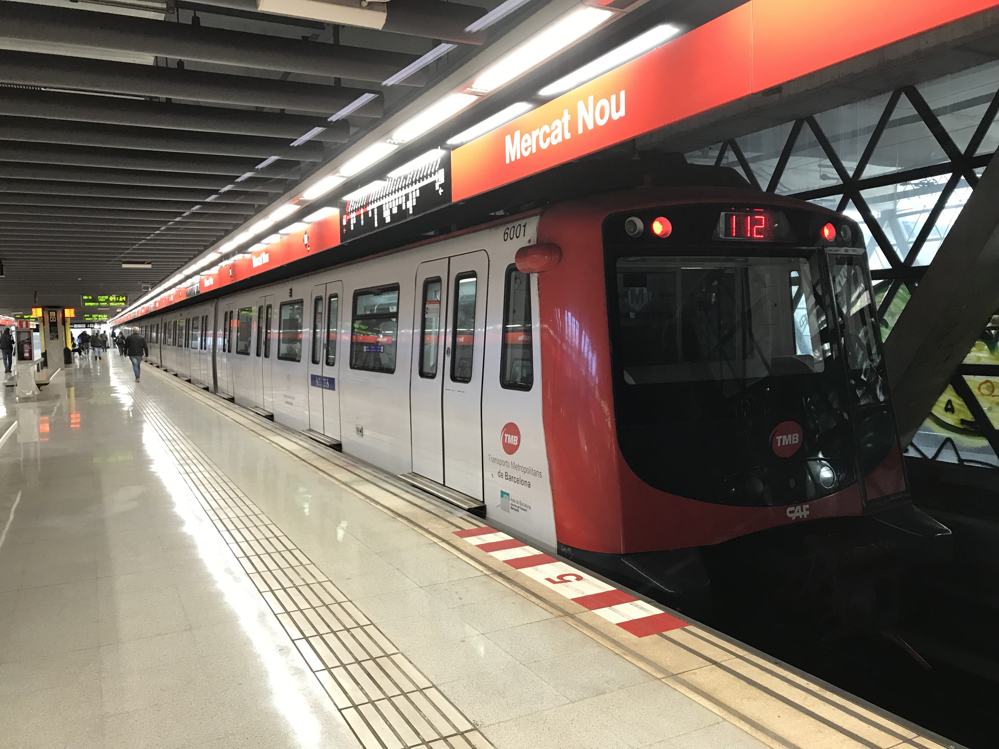 Zug der Baureihe 6000 im U-Bahnhof Mercat Nou